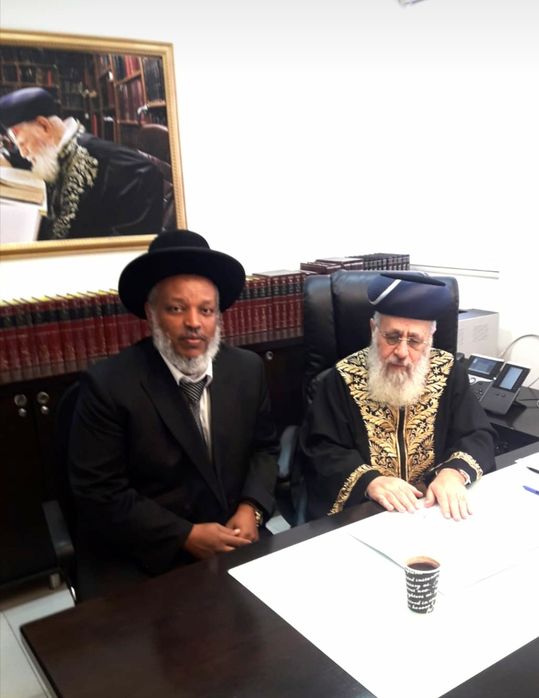 הרב ראובן וובשת, בלשכתו של הראשון לציון